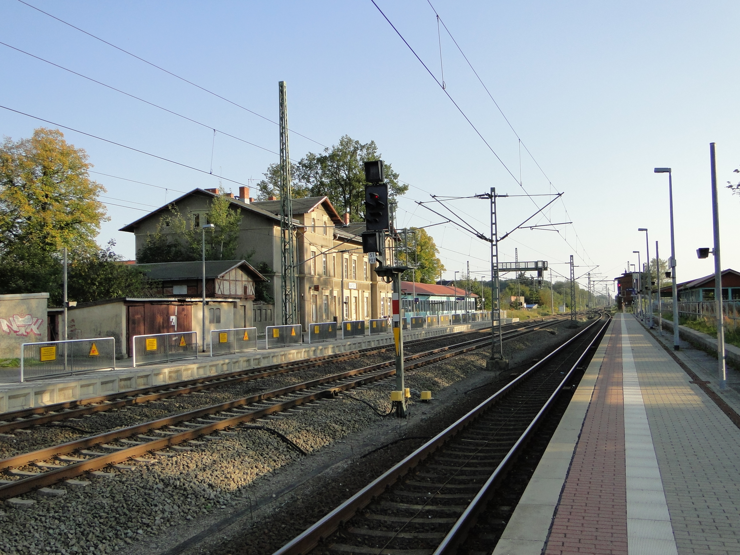 Bahnhof - Karstädt, Prignitz